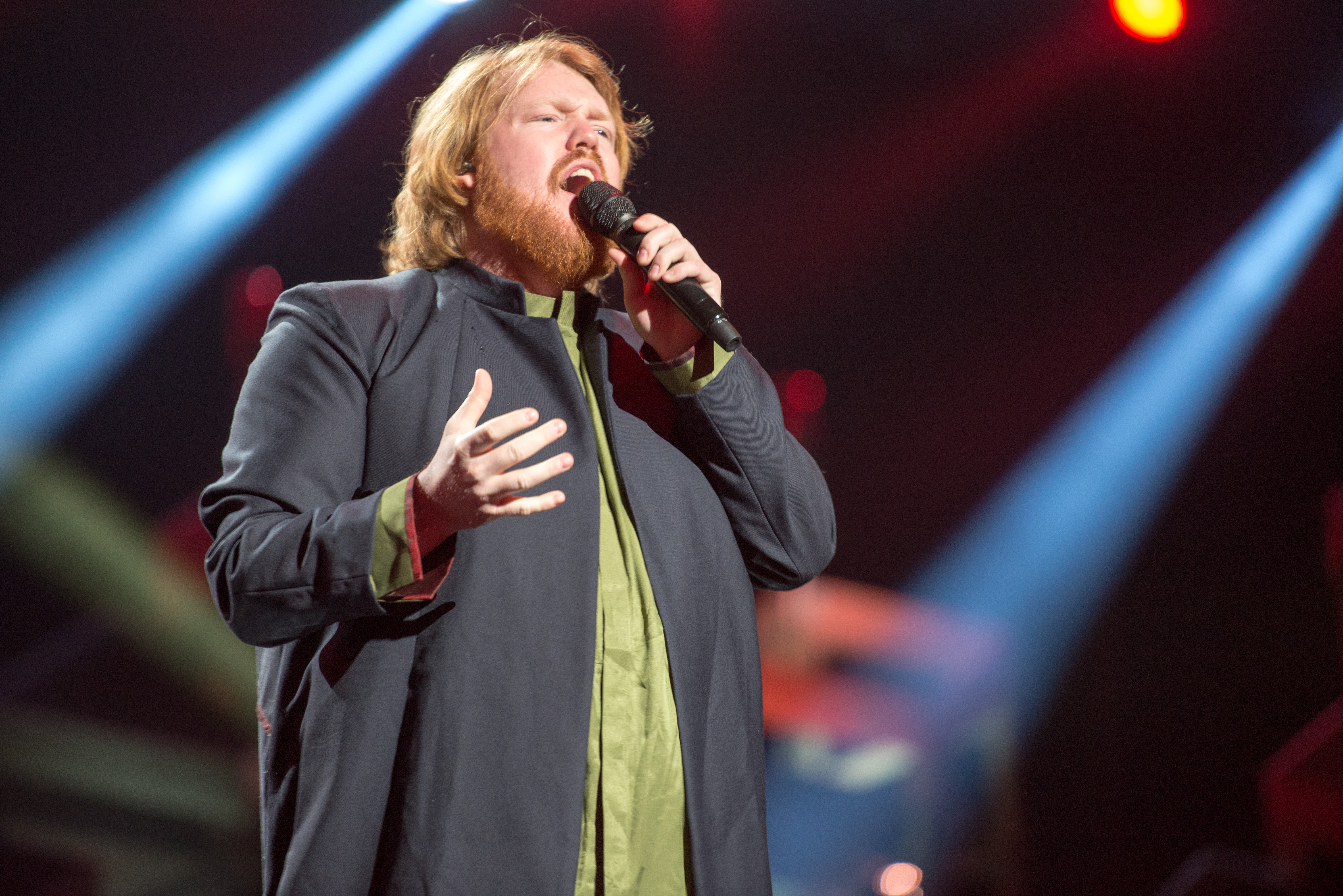 Matrin Almgren under repitionen inför Melodifestivalen i Malmö 2018.